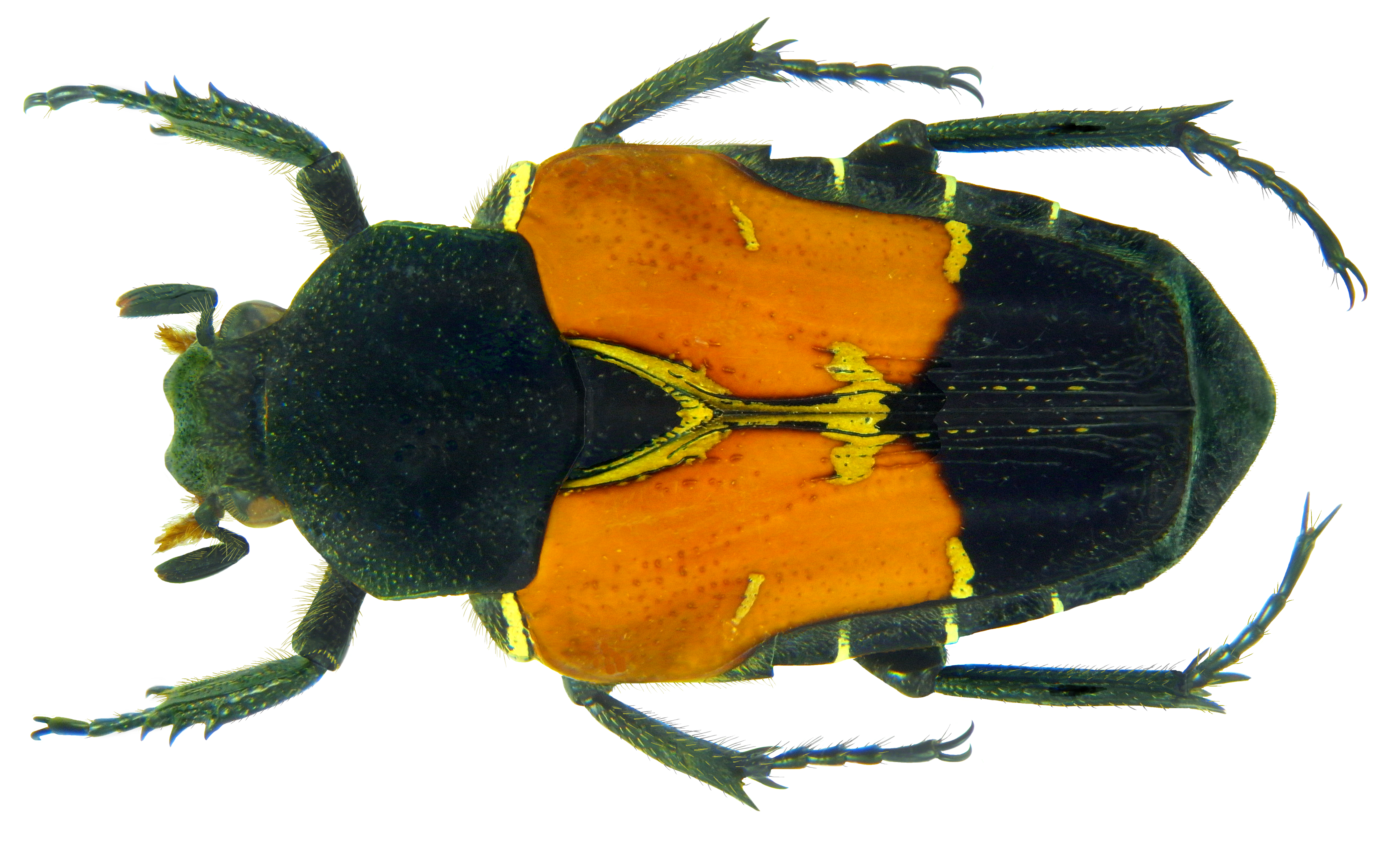 Familie: Scarabaeidae Groesse: 19 mm (18,9-24,2 mm) Verbreitung: Sulawesi Fundort: Indonesien, Sulawesi, Palu leg. local collectors, VIII.2001; det. U.Schmidt, 2013 Photo: U.Schmidt, 2013